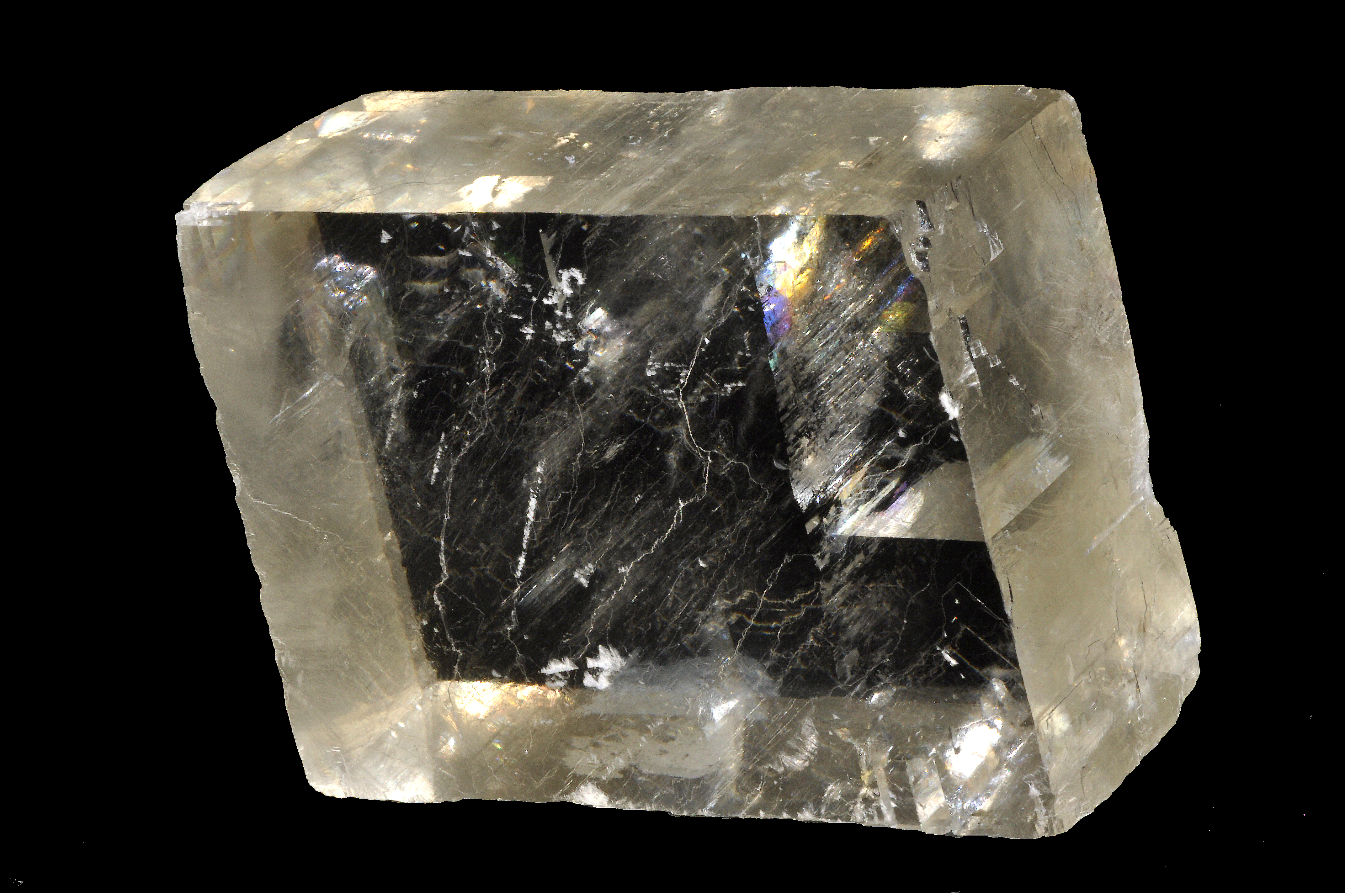 Calcit - transparente, rhomboedrische Form, Synonym: Isländer Doppelspat